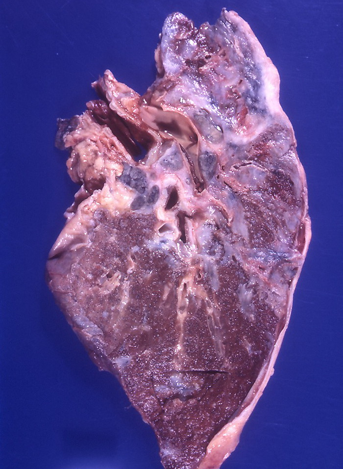 Sarcoidosis - Fibrosis